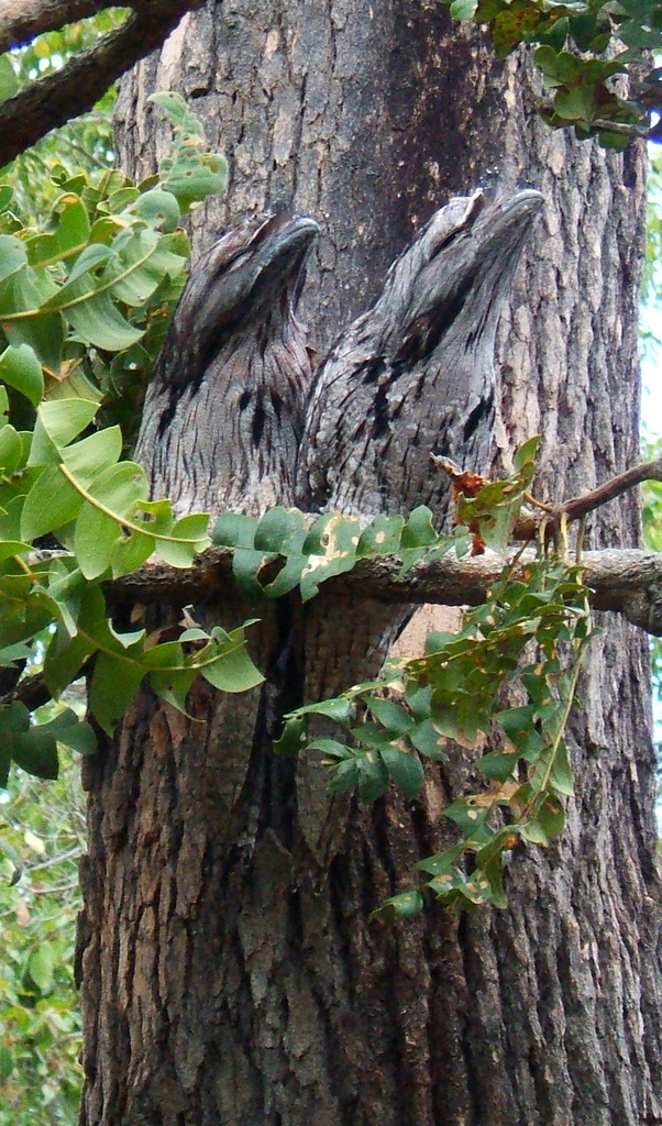 Podargus strigoides. Camouflage (aggrandir l'image)